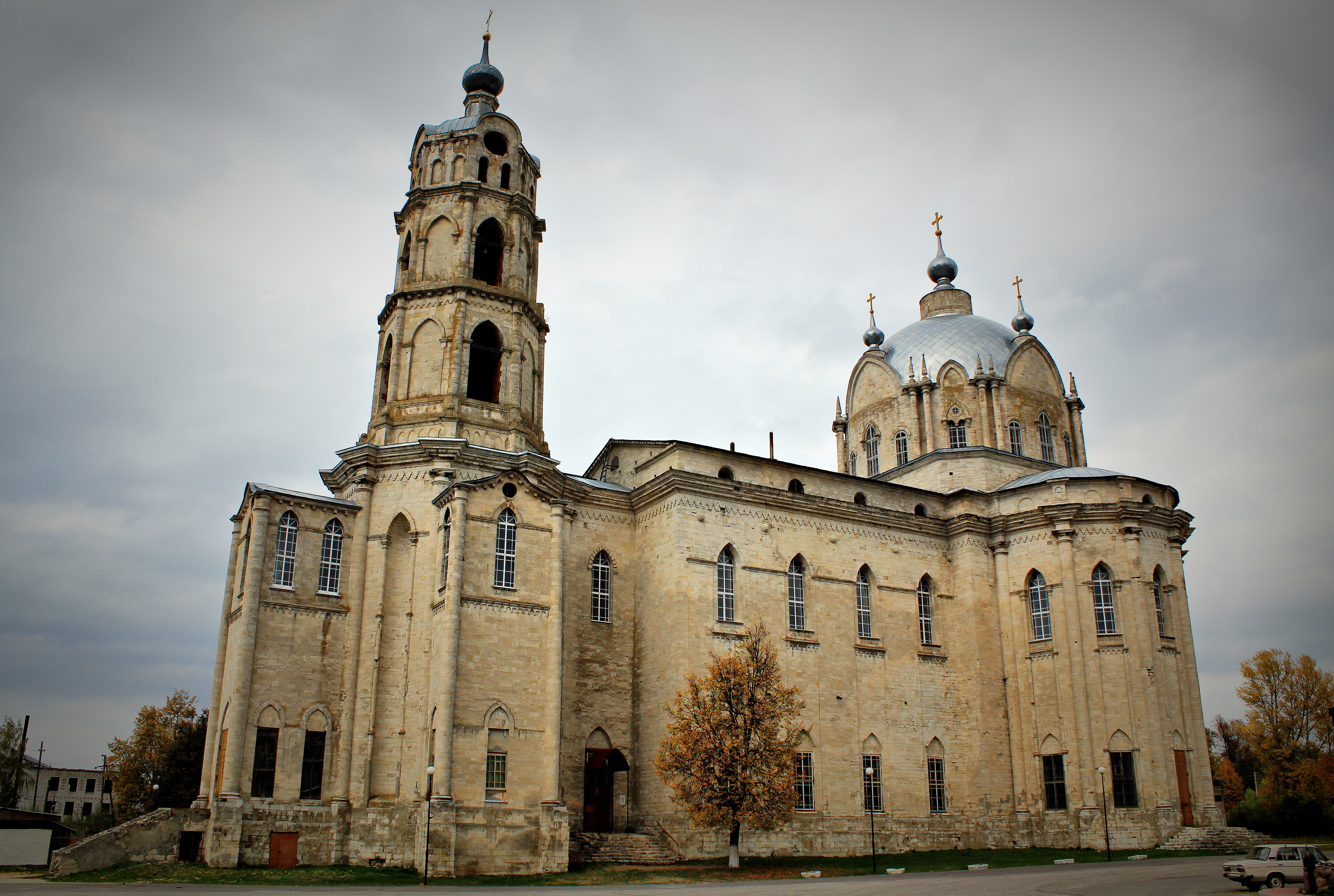 Церковь Пресвятой Троицы (Рязанская область, Касимов, посёлок Гусь-Железный, улица Ленина, 1, 10, 34, Октябрьская улица, 65, 66, 68)